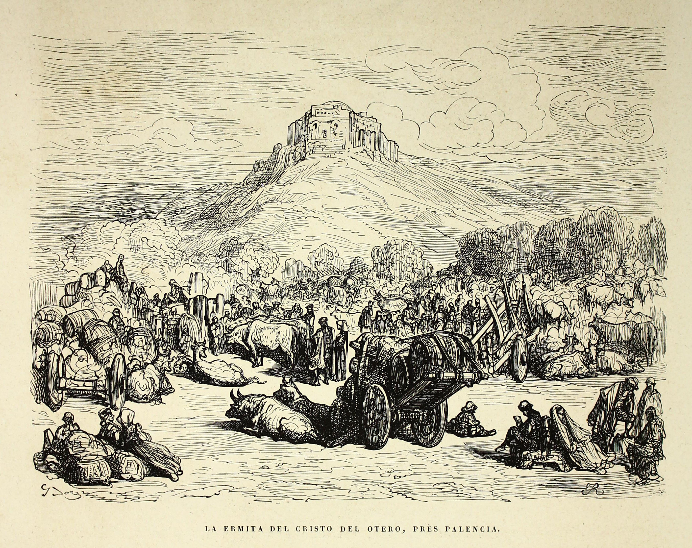 Autor: Davillier, Jean Charles, barón, 1823-1883 Descripción bibliográfica: L'Espagne / par Le Baron CH. Davillier ; ilustrée de 309 gravures dessinées su bois par Gustave Doré. - Paris : Librairie Hachette, 1874. - 799 p. : il. Materia: España- Geografía Materia: España- Usos y costumbres Ilustrador: Doré, Gustave, 1832-1883 Editor: Libreria Hachette Lugar de impresión: Francia, París Localización: Libro completo